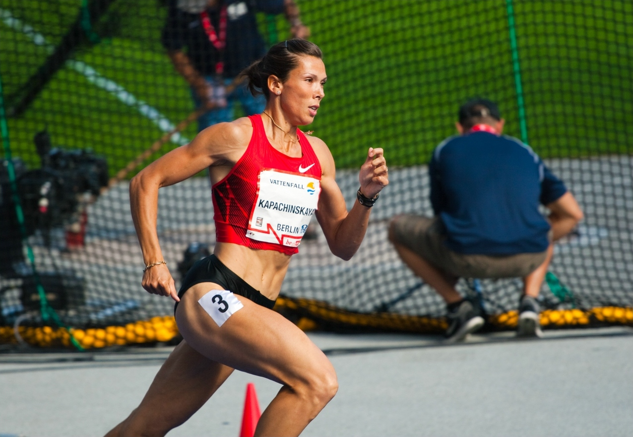 Anastasiya KAPACHINSKAYA - Siegerin 400m